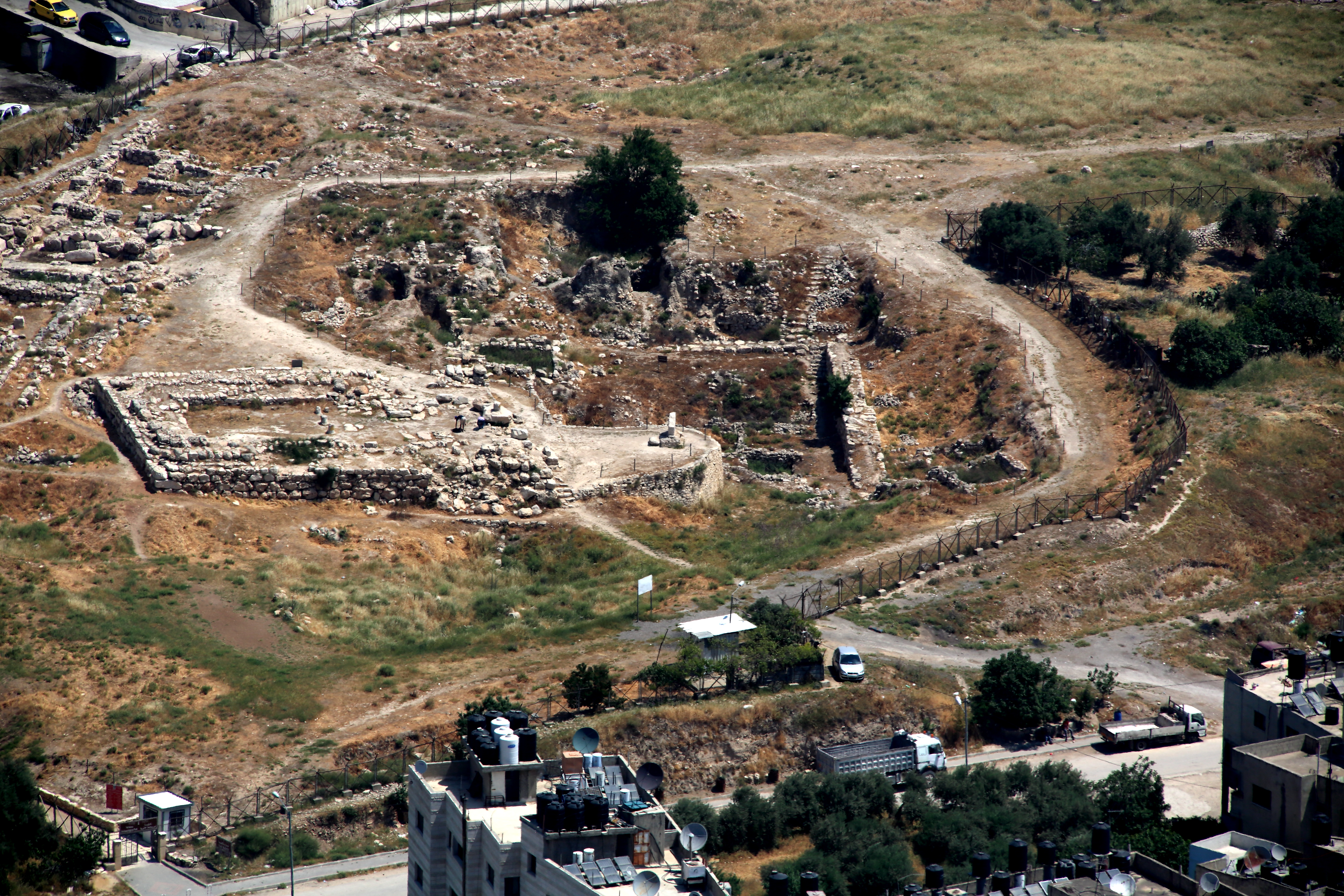 שרידי חומת שכם המקראית, הממוקמת בפאתי העיר שכם. בצד החומה ניצב סלע גדול מסותת, המיוחס לאבן הגדולה הנזכרת במעמד כריתת הברית בשכם, ובסמוך לו נראים שרידים של מבנה שיש המייחסים אותו ל'מקדש ה שבו שהה ארון הברית בעת כריתת הברית.